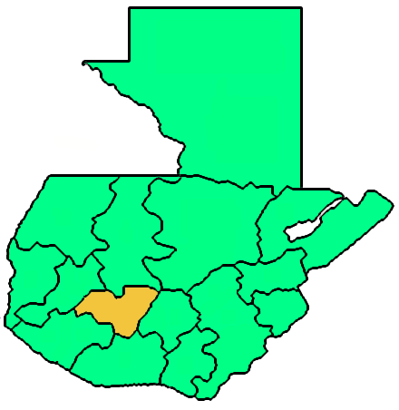 Mappa della diocesi cattolica di Sololá-Chimaltenango, in Guatemala. Lavoro personale eseguito a partire da questa immagine di Commons. Fonte per i confini delle diocesi